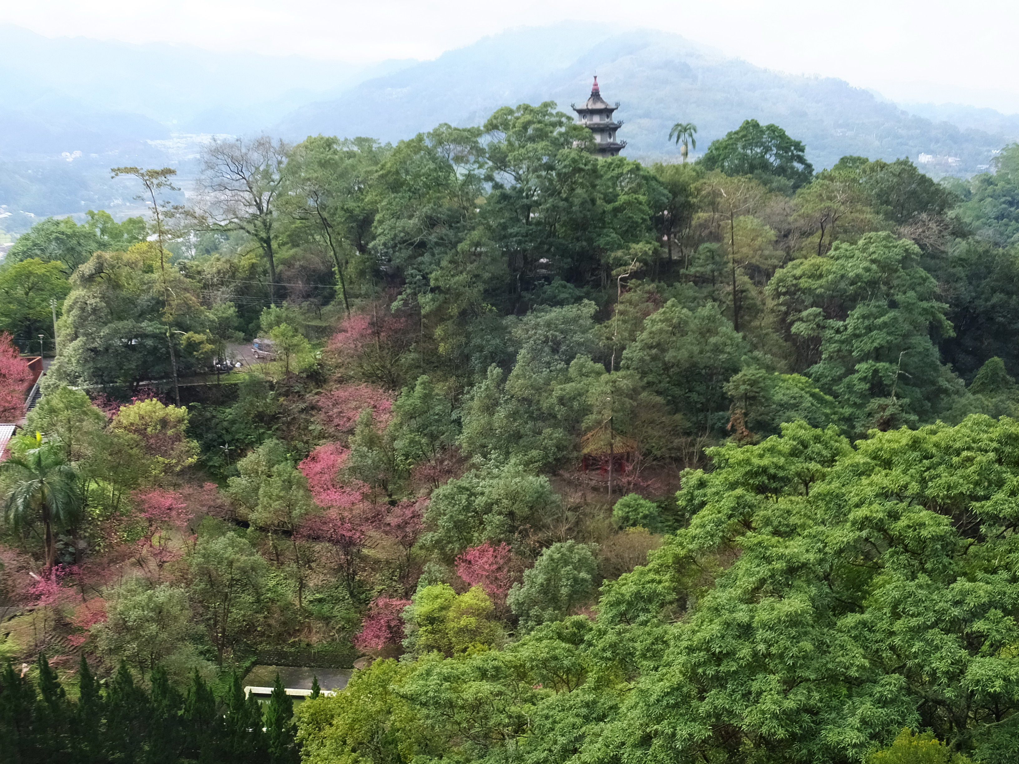 獅頭山 Shitou Mountain